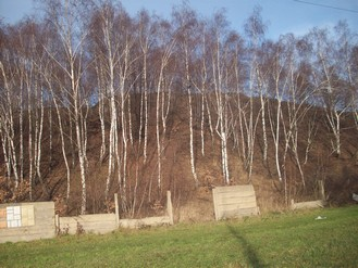 Halda